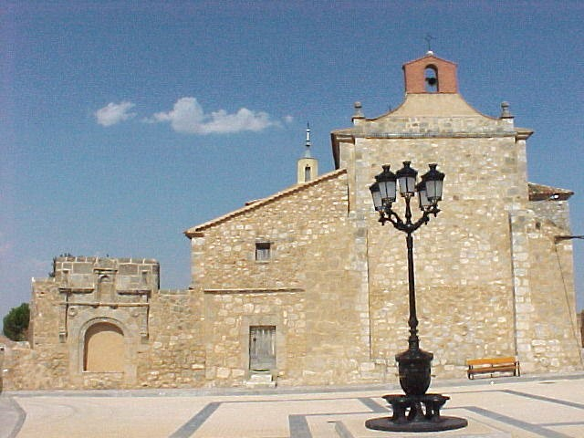 Plaza Mayor(Taroda - Soria. Spain)